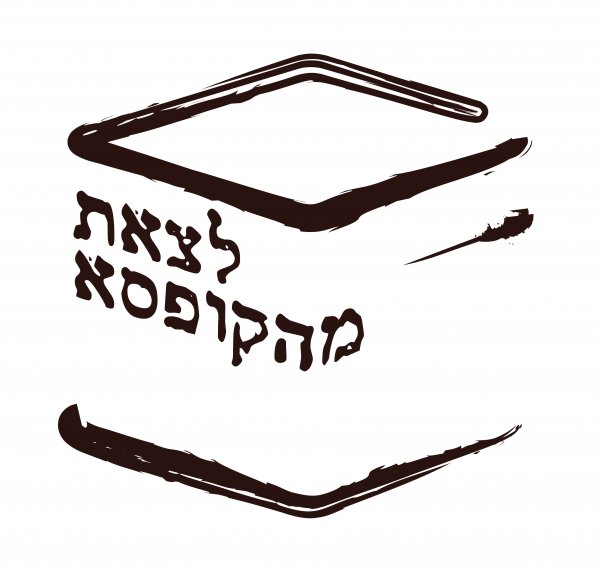 לוגו לצאת מהקופסא- עיצוב אור חבס